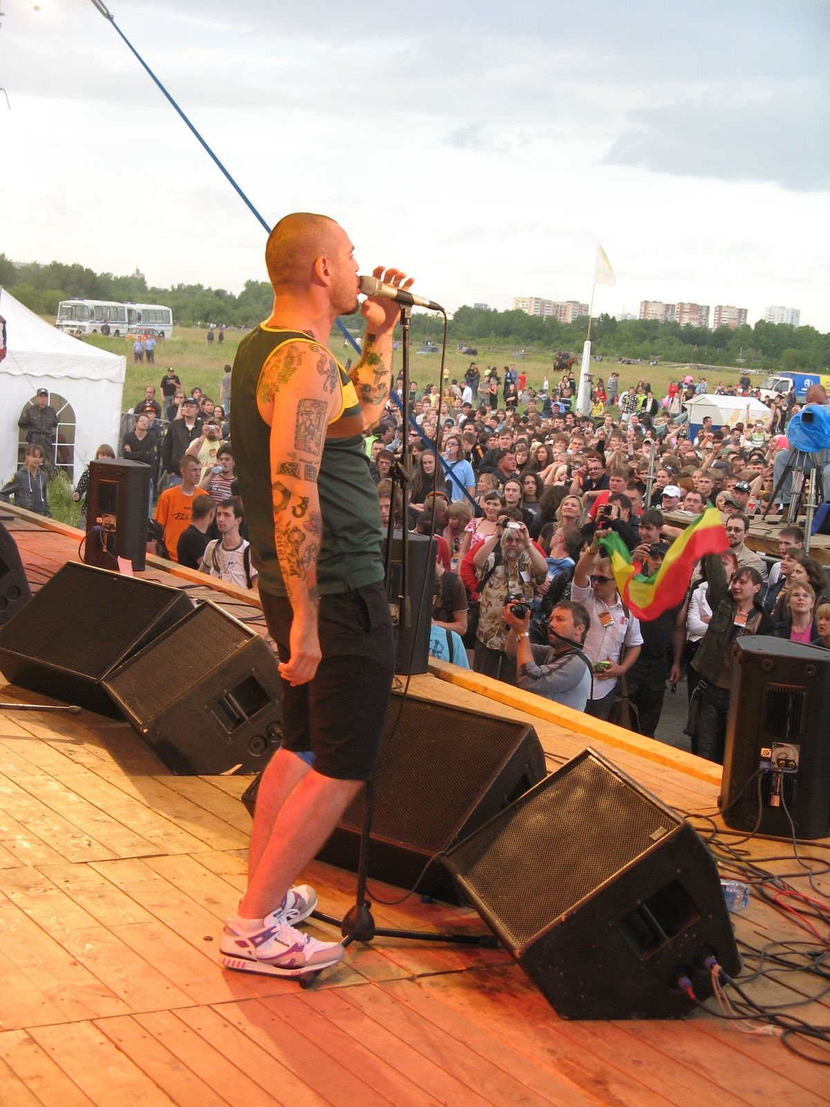 Группа "Ляпис Трубецкой" на фестивале "Rock-Line-2009" в Перми